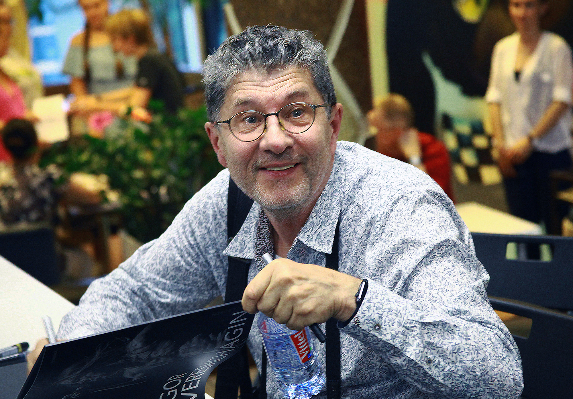 Презентация фотоальбома Игоря Верещагина